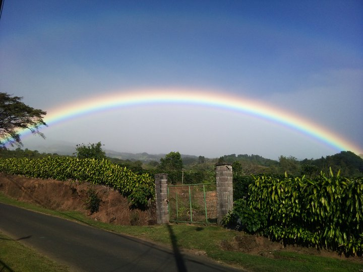 Vista panoramica desde el Volcán Barva, Costa Rica